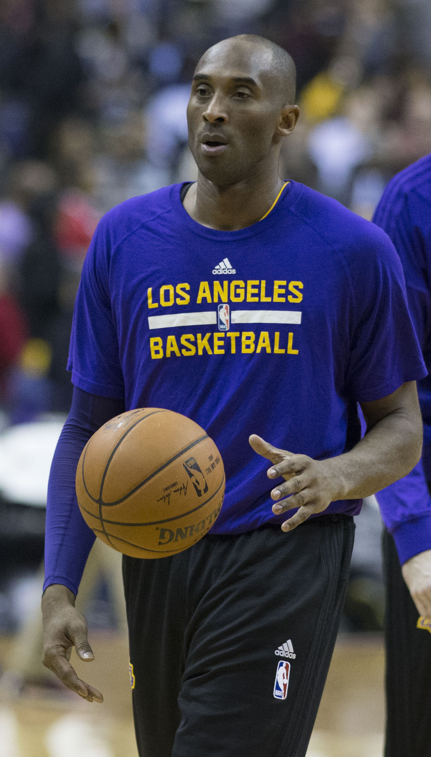 Kobe Bryant of Los Angeles Lakers